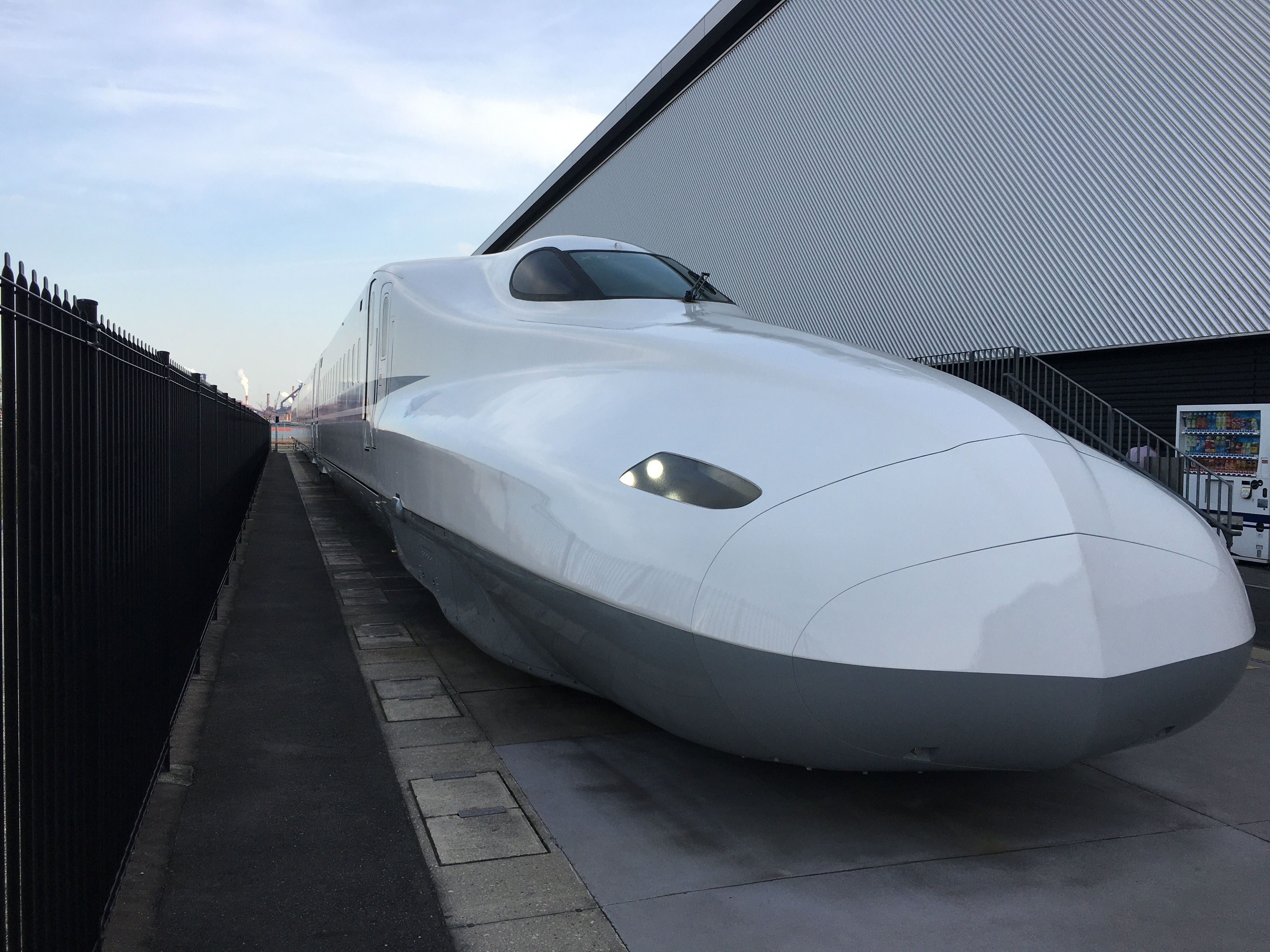 2019年7月17日より117系電車に代わりリニア・鉄道館の屋外に展示されたN700系量産先行車（X0編成)